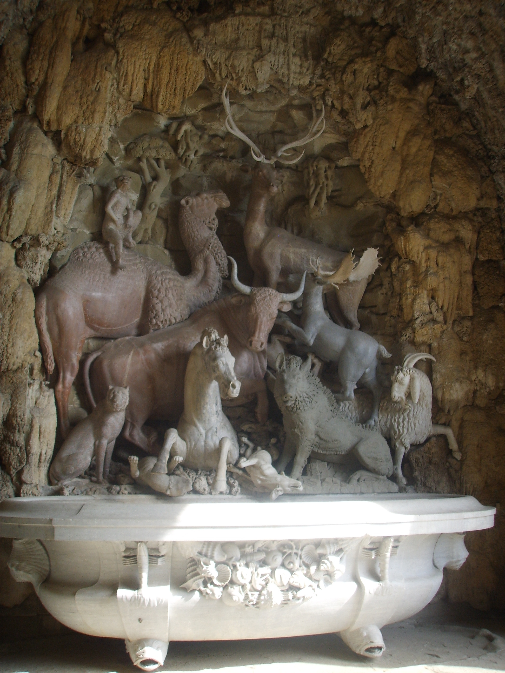 Parco di Villa Reale di Castello (Villa di Castello) Grotta degli animali by Giambologna in Florence Italy